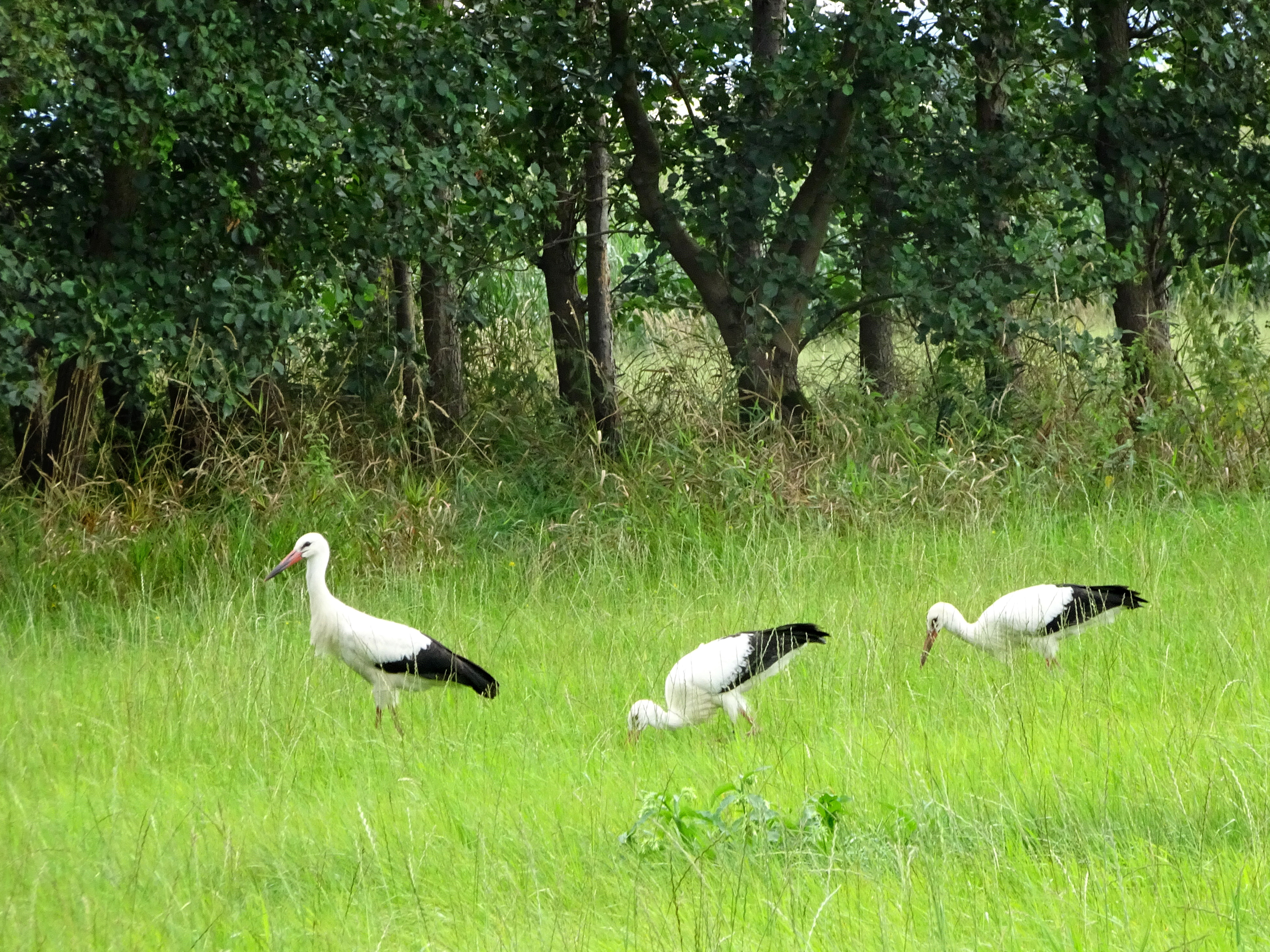 Aue bei Gerstungen im Wartburgkreis vom Werratal-Radweg aus gesehen. EU-Vogelschutzgebiet Werra-Aue zwischen Breitungen und Creuzburg in Thüringen. Gebietsnummer 5127-401.